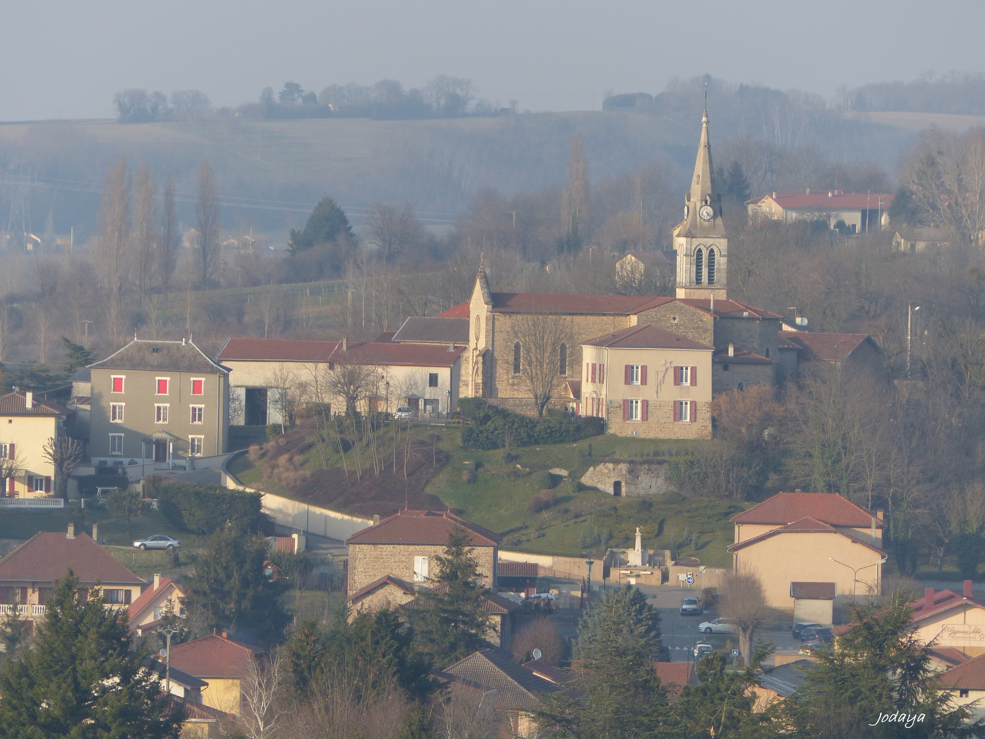 Charantonnay